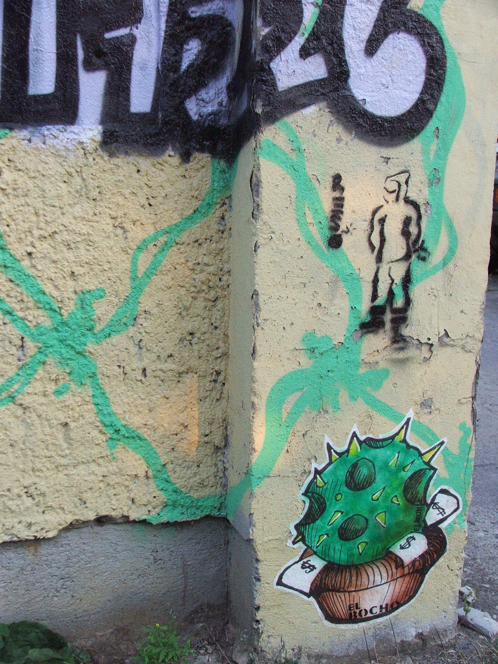 graffiti stencil sticker